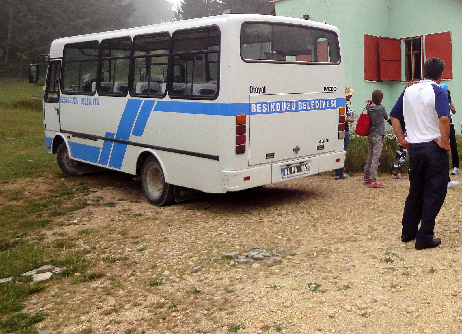 Otoyol na szlaku w Turcji (prowincja Trabzon)